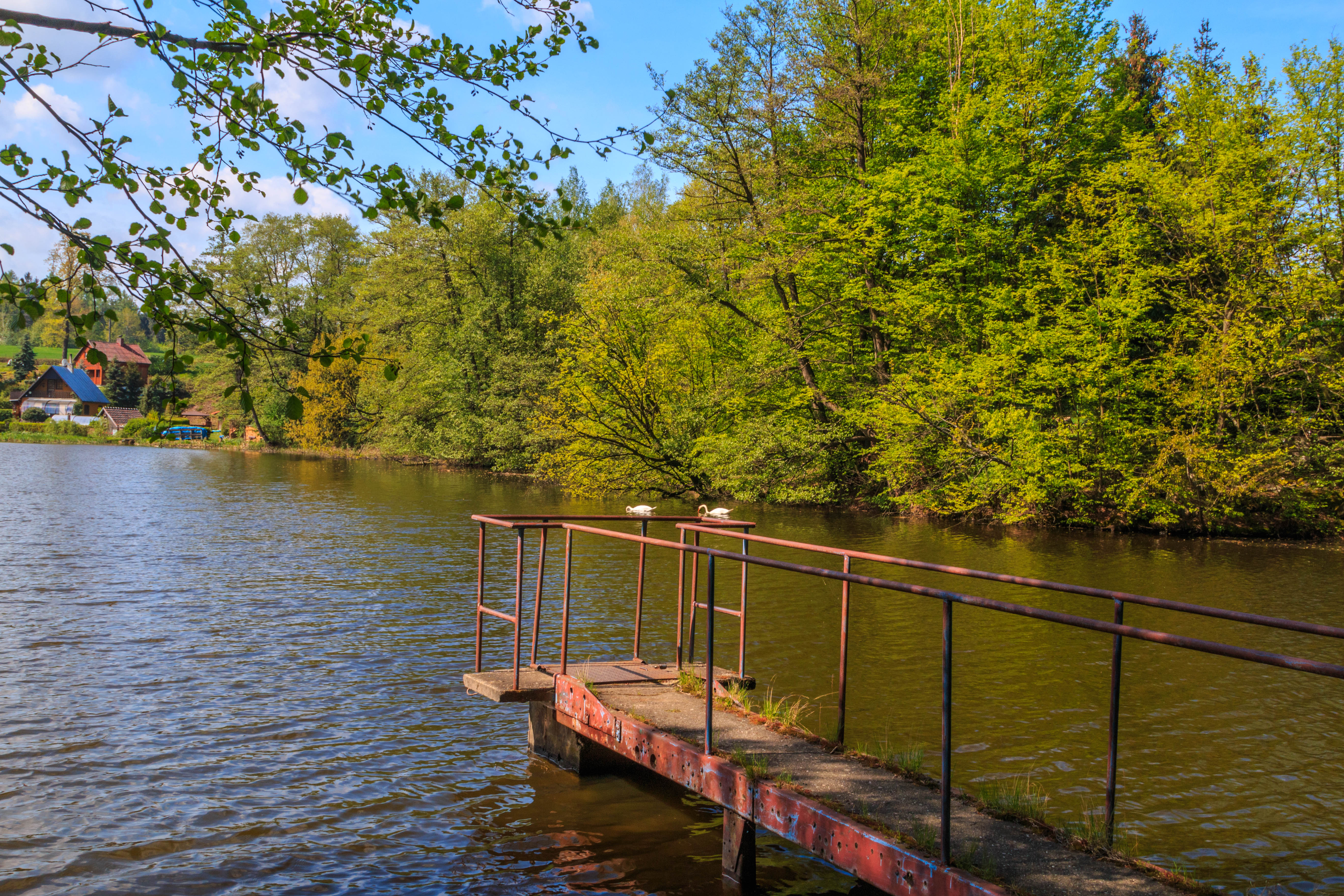 Rybník Chobot u Rašov Project: Vodstvo.